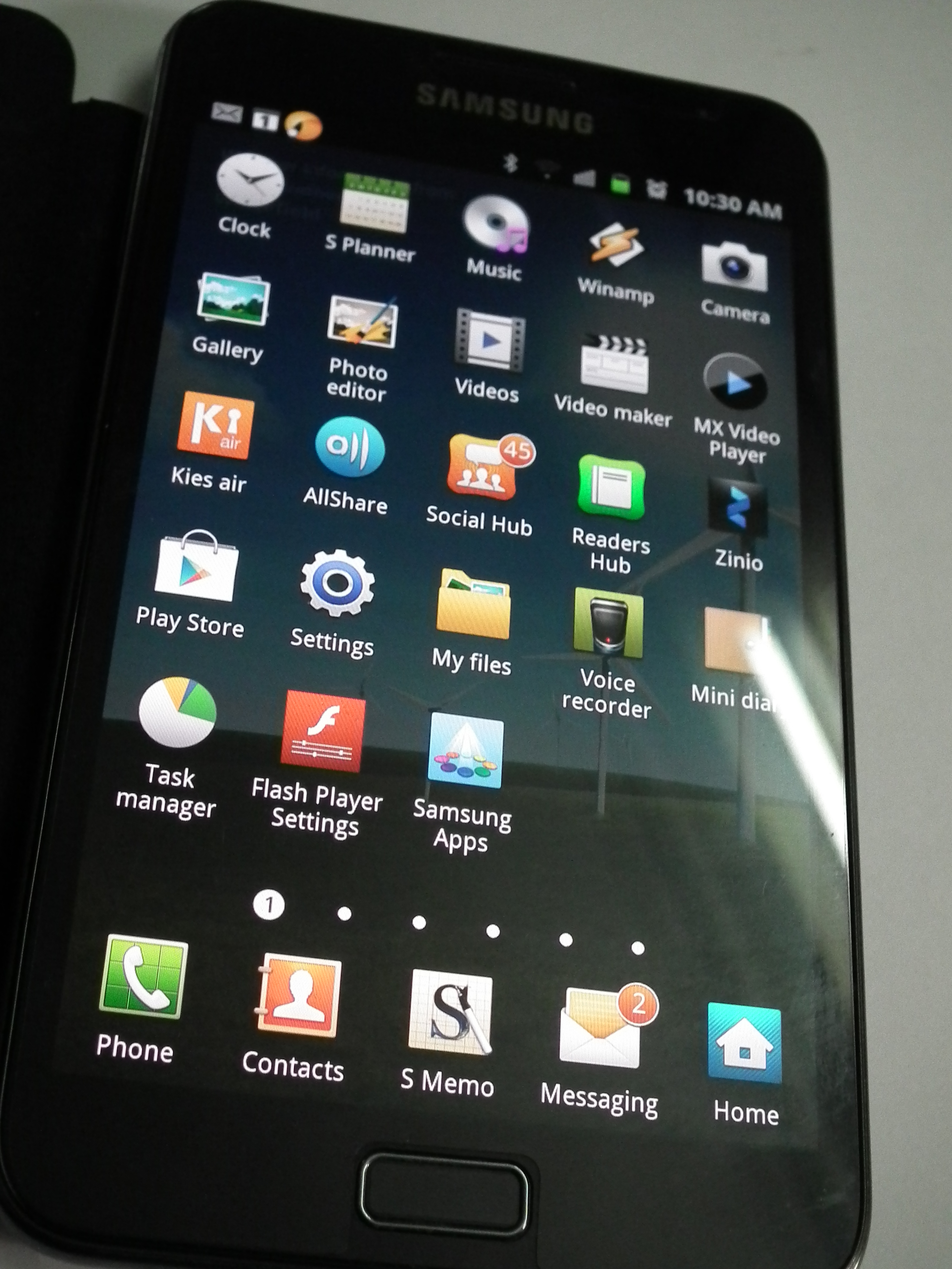 A snap of galaxy note (Samsung GT-N7000).